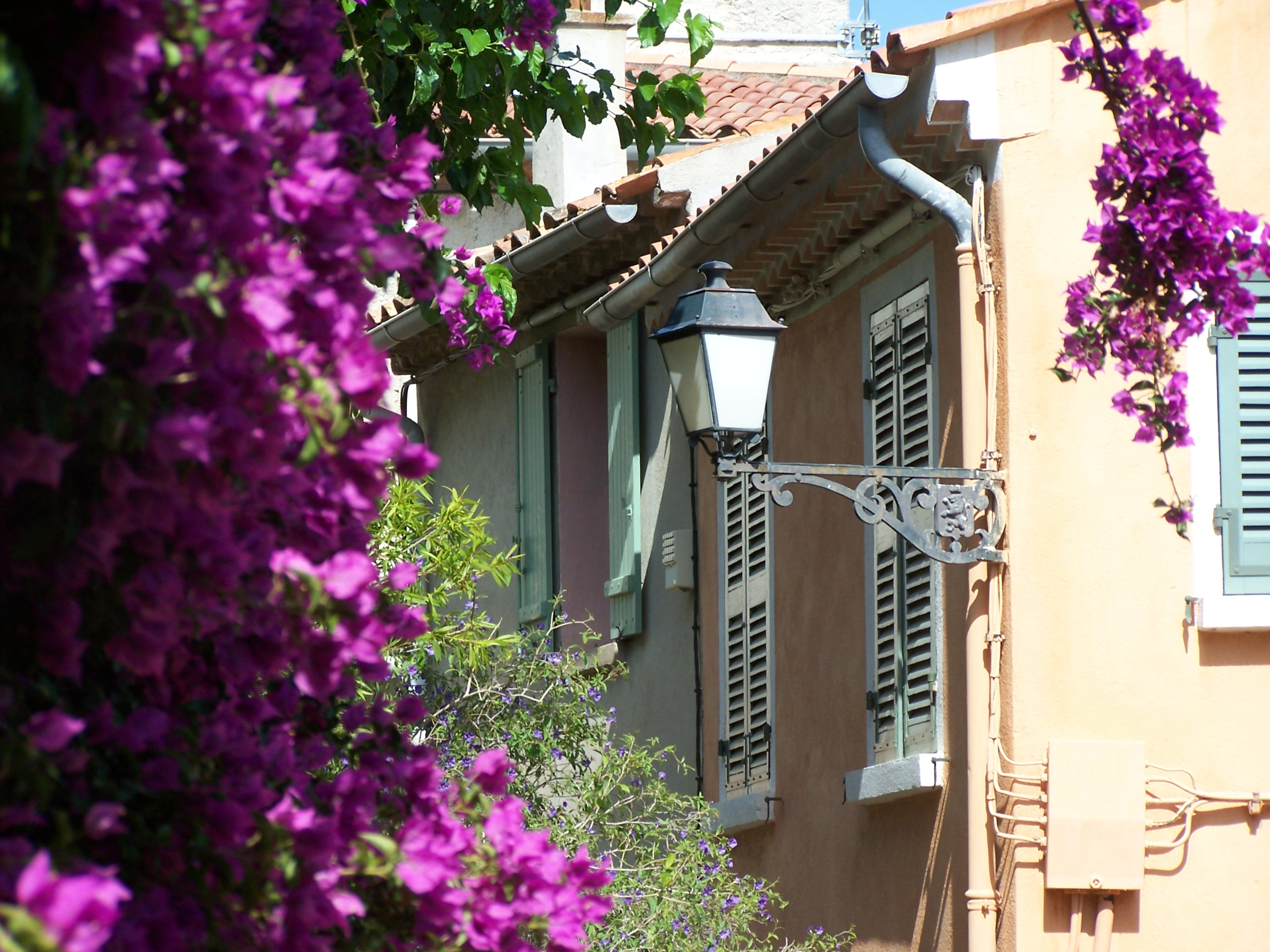 Rue de Bormes